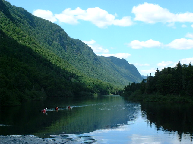 Rivière Jacques-Cartier vue du Pont Banc